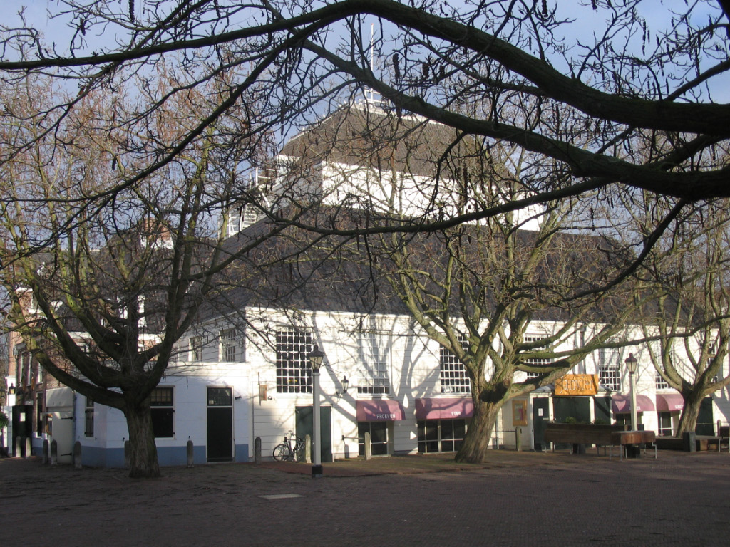 Foto van de zuidkant van de Amstelkerk